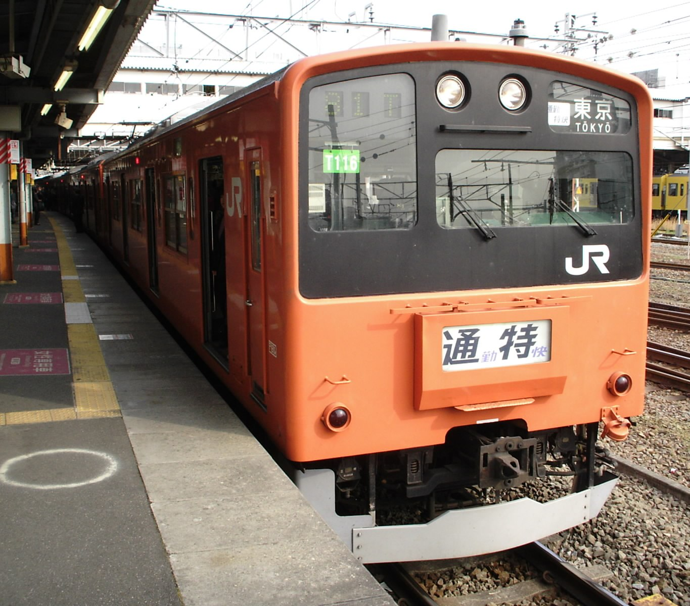 拝島駅で